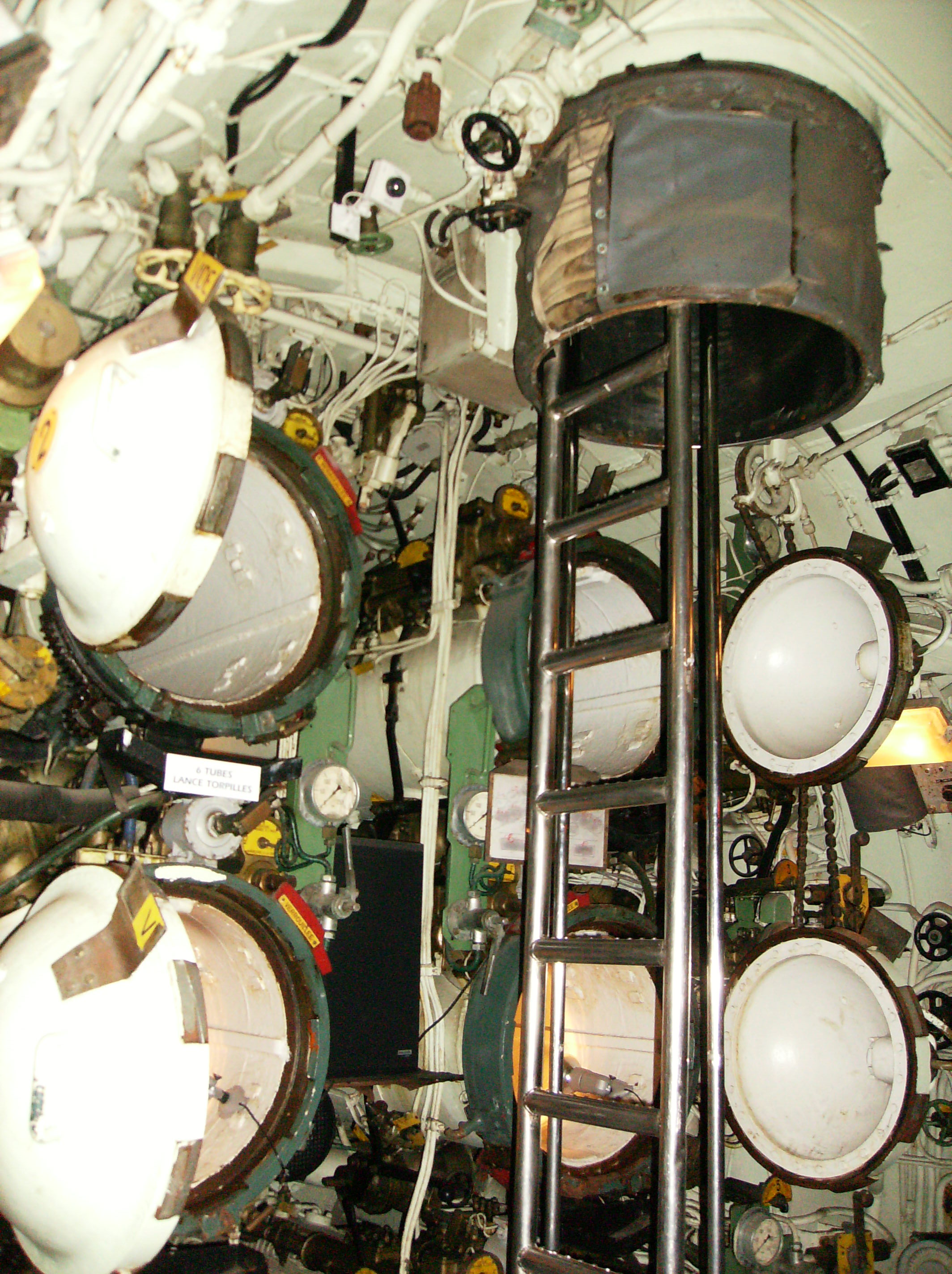 sous-marin musée Espadon salle des Torpilles Saint-Nazaire France